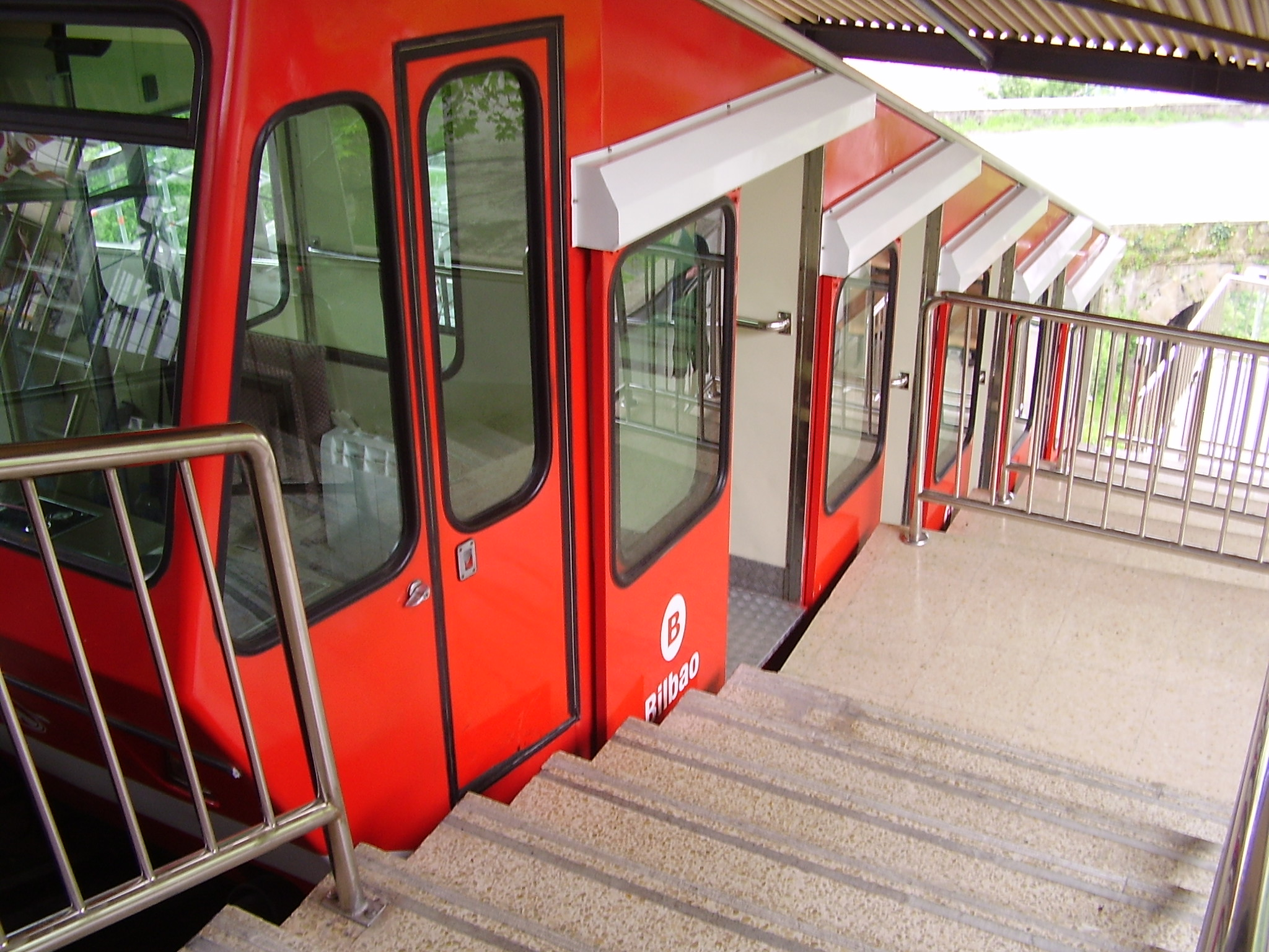 Funiculaire d'Artxanda, Bilbao